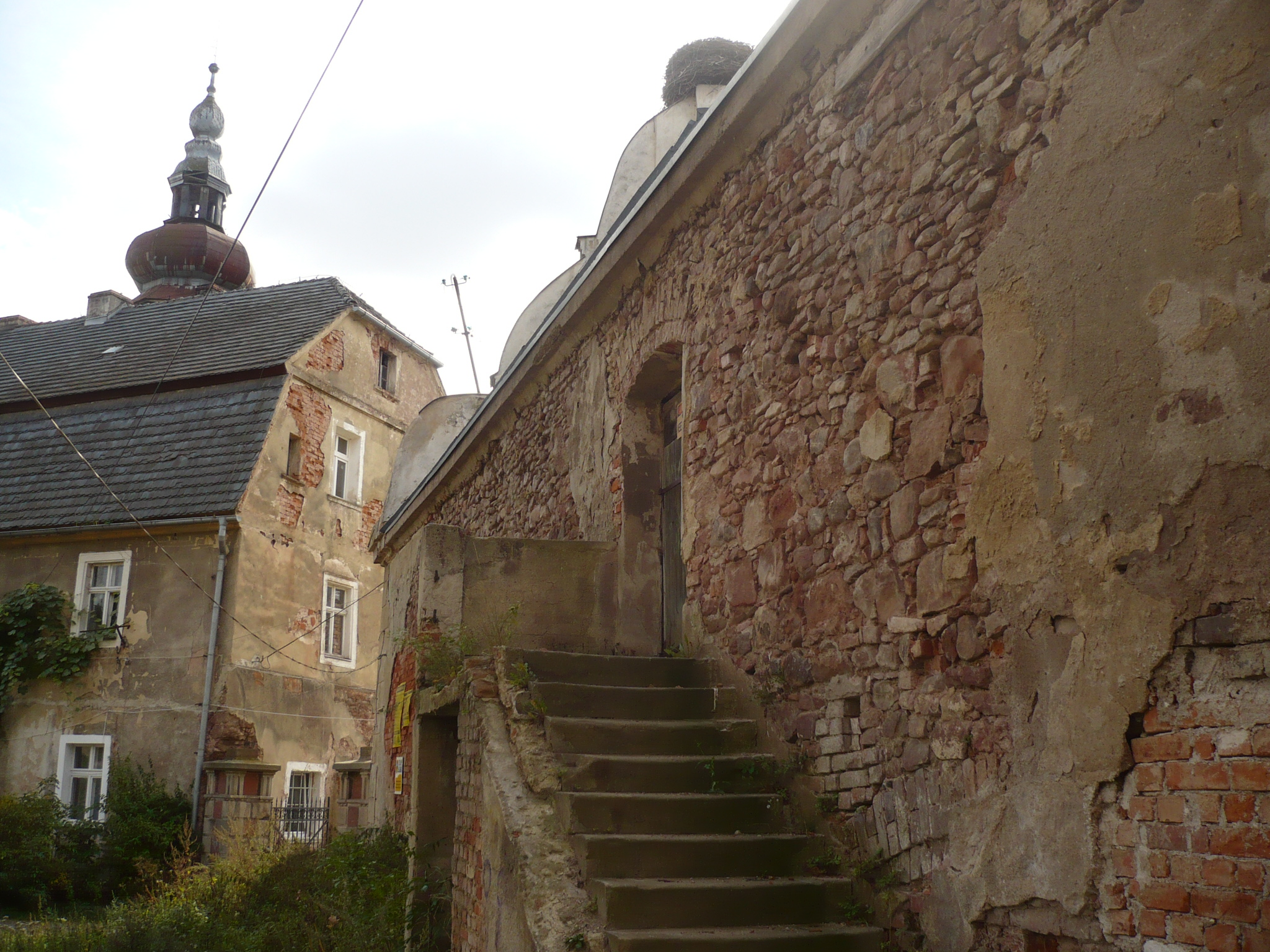 Sarny. Spichlerz